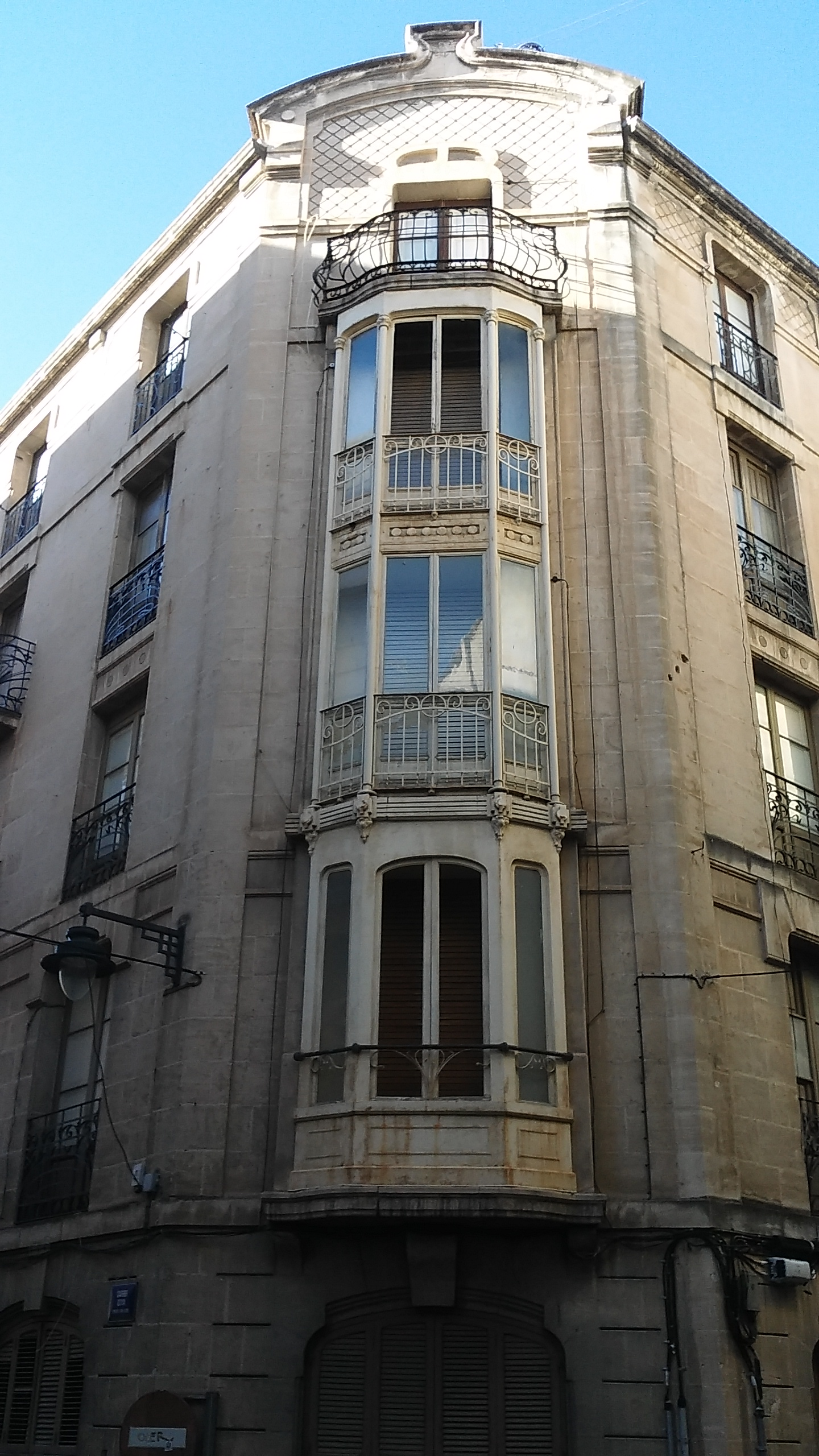 Casa modernista en carrer Sant Josep número 26, en Alcoy (Alacant). Obra de Timoteo Briet Montaud.